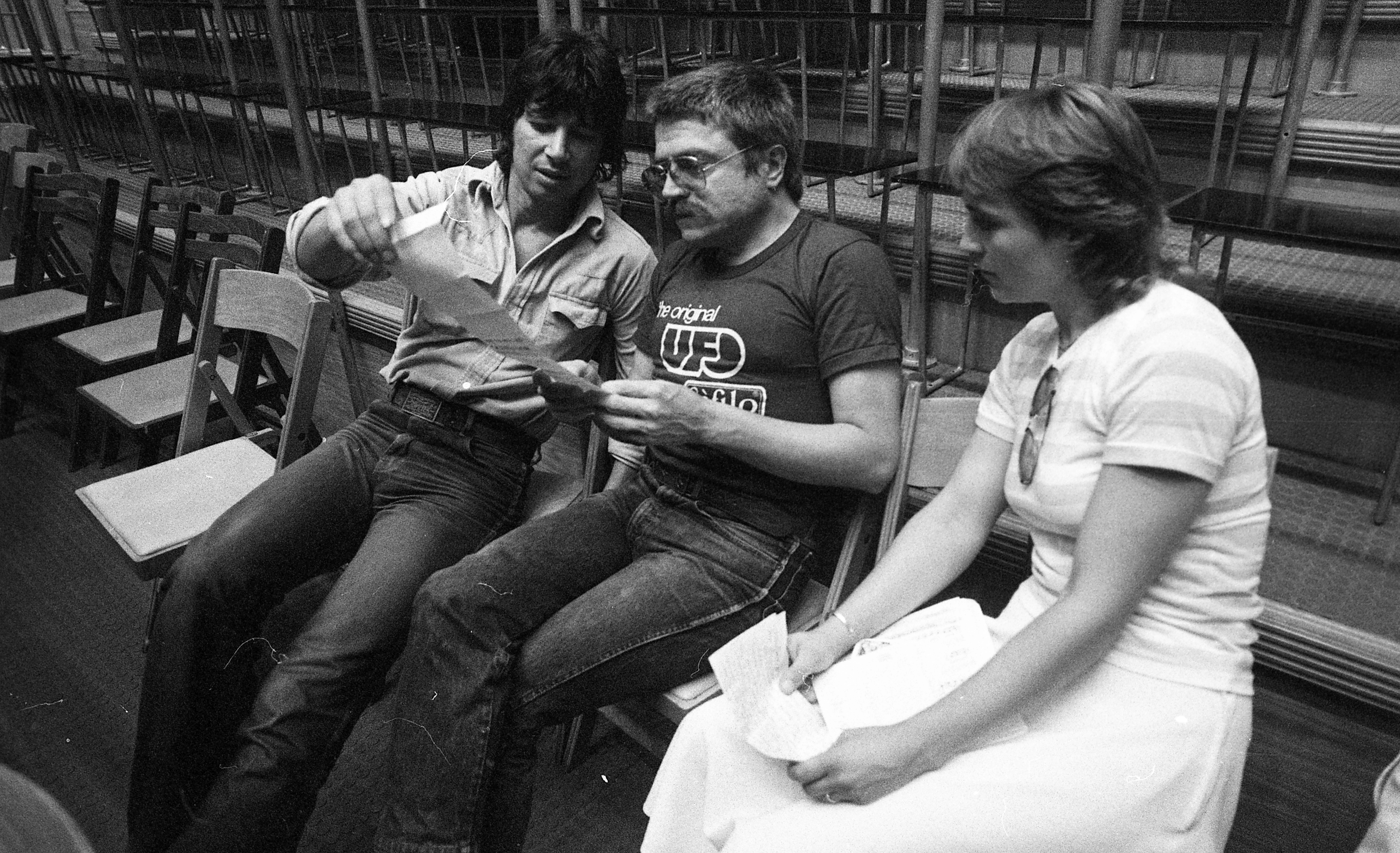 ródy János, Szörényi Levente, Kovács Kati. 1981-ben